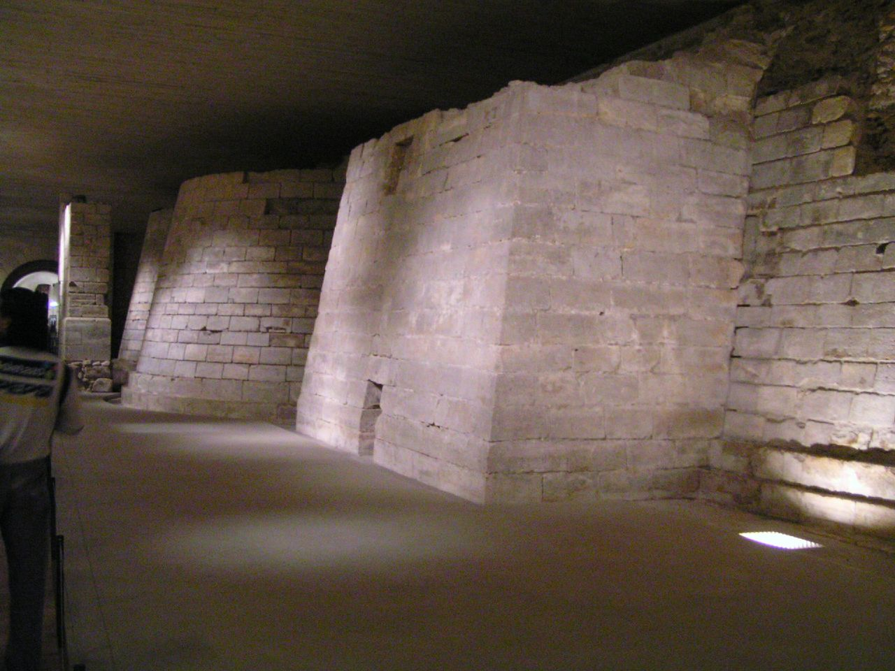 una muestra de como era antes el louvre